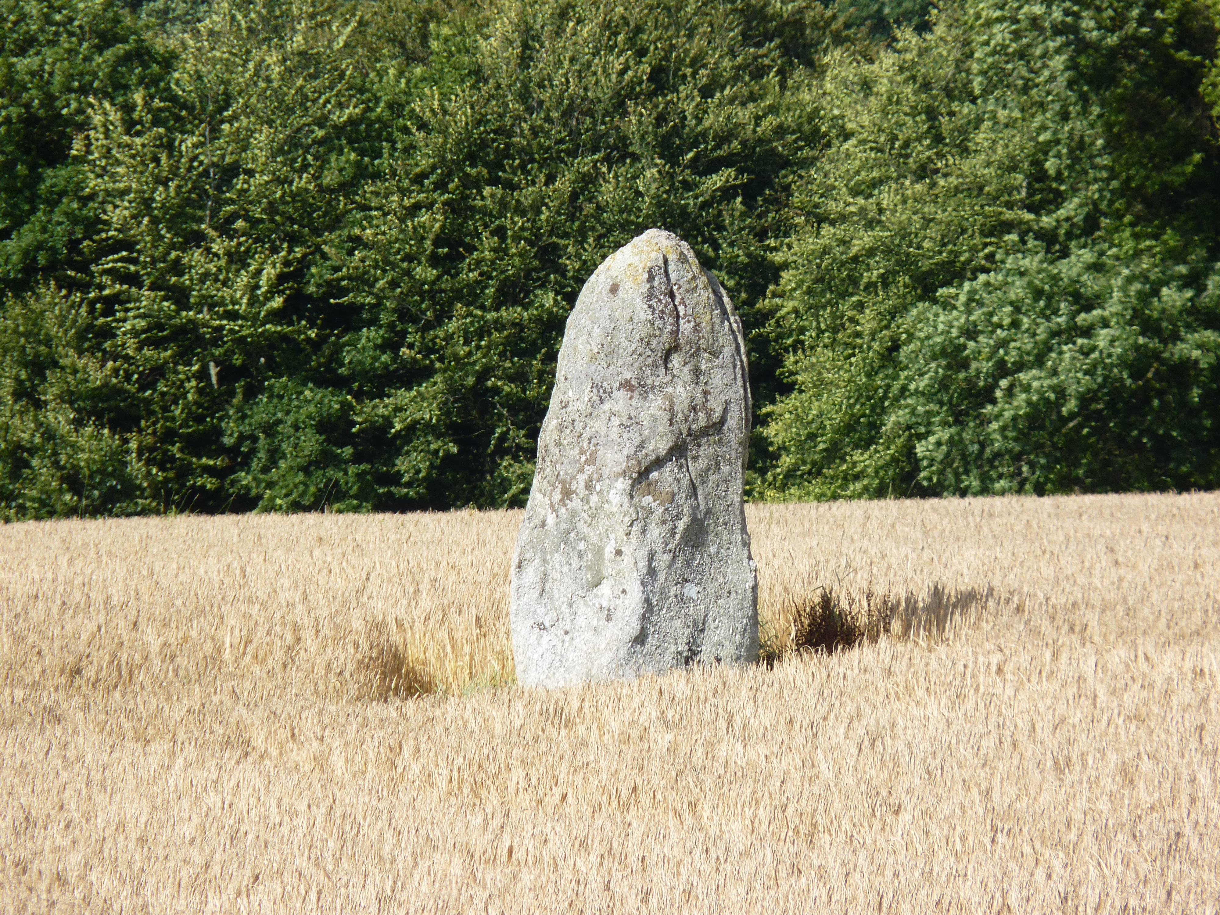 Menhir avec une trace de croix gravée.